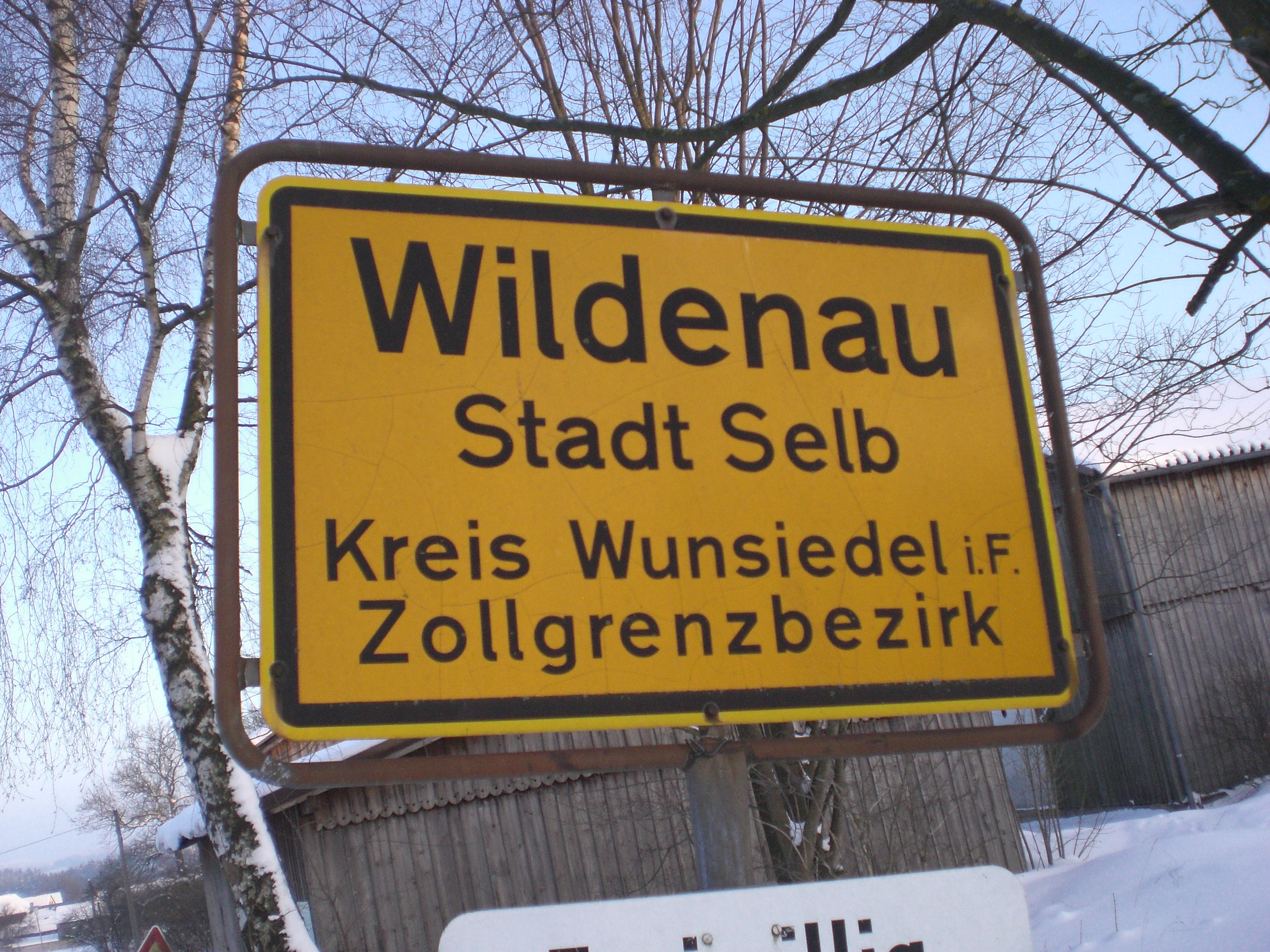 Dieses Foto zeigt das vor der DIN-Schriftreform von 1980/1981 hergestellte Ortstafel des Selber Ortsteils Wildenau, das damals noch mit dem Hinweis "Zollgrenzbezirk" hergestellt wurde.